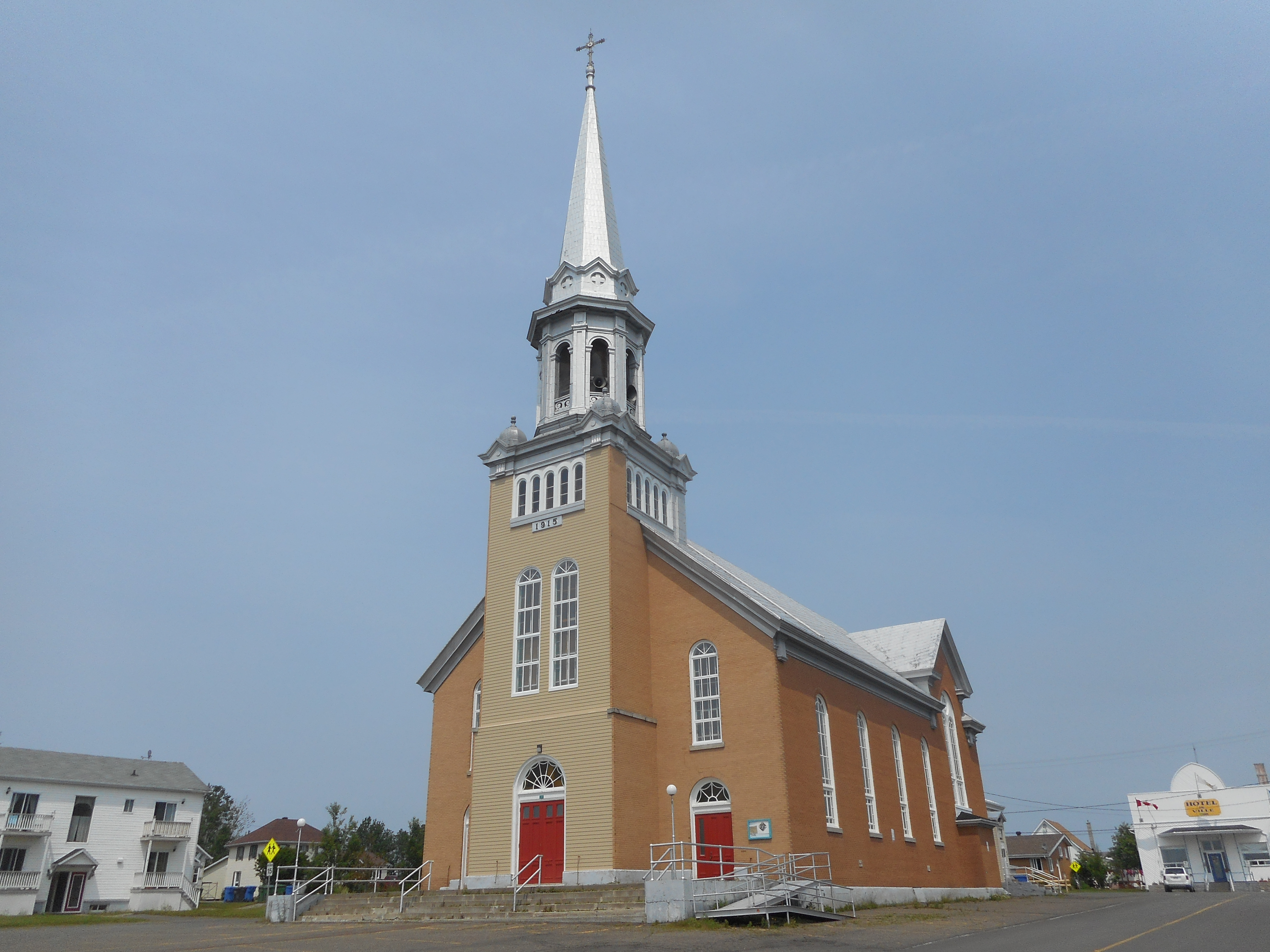 Église de Saint-Siméon, avenue de l'Église, Saint-Siméon, Québec